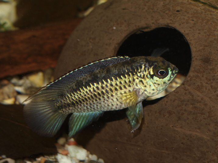 Nannacara anomala, male